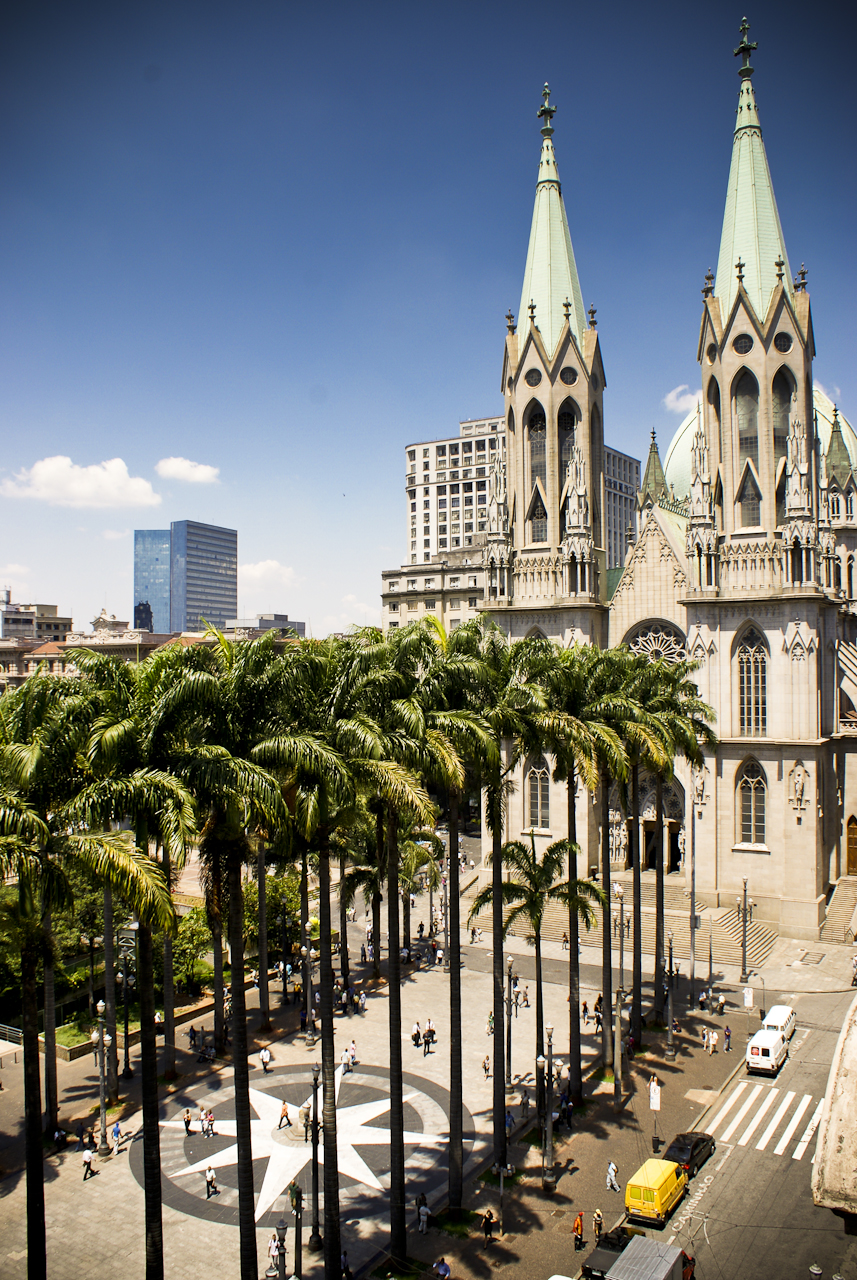 Catedral Metropolitana de São Paulo, São Paulo, Brasil.